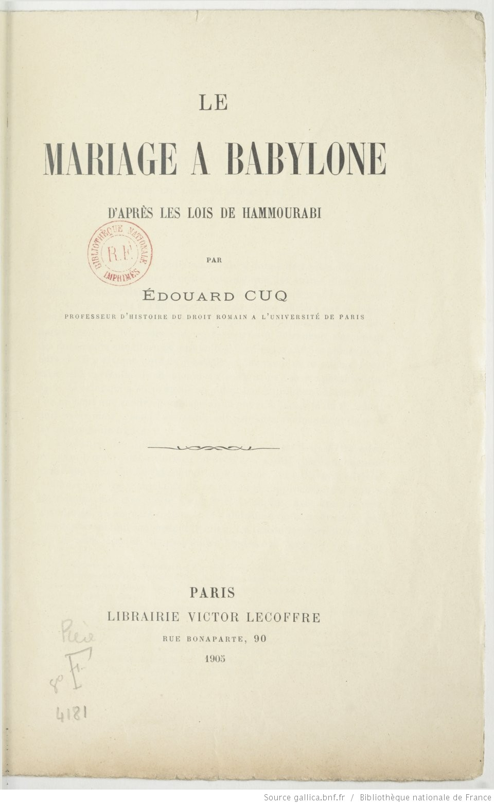 Le Mariage à Babylone d'après les lois de Hammourabi